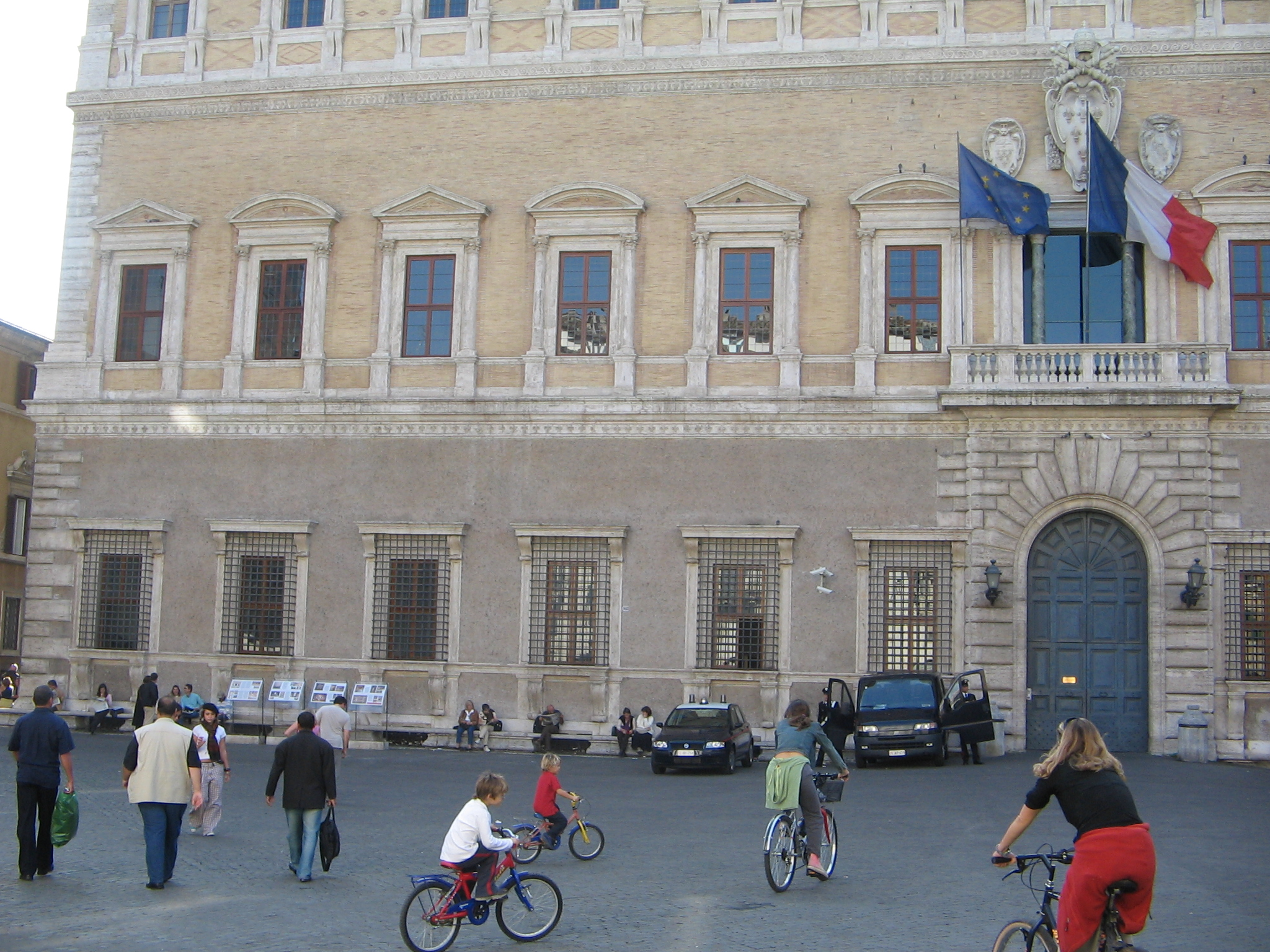 Piazza Farnese (Roma): il Palazzo Farnese (ambasciata francese). 16/X/2005.